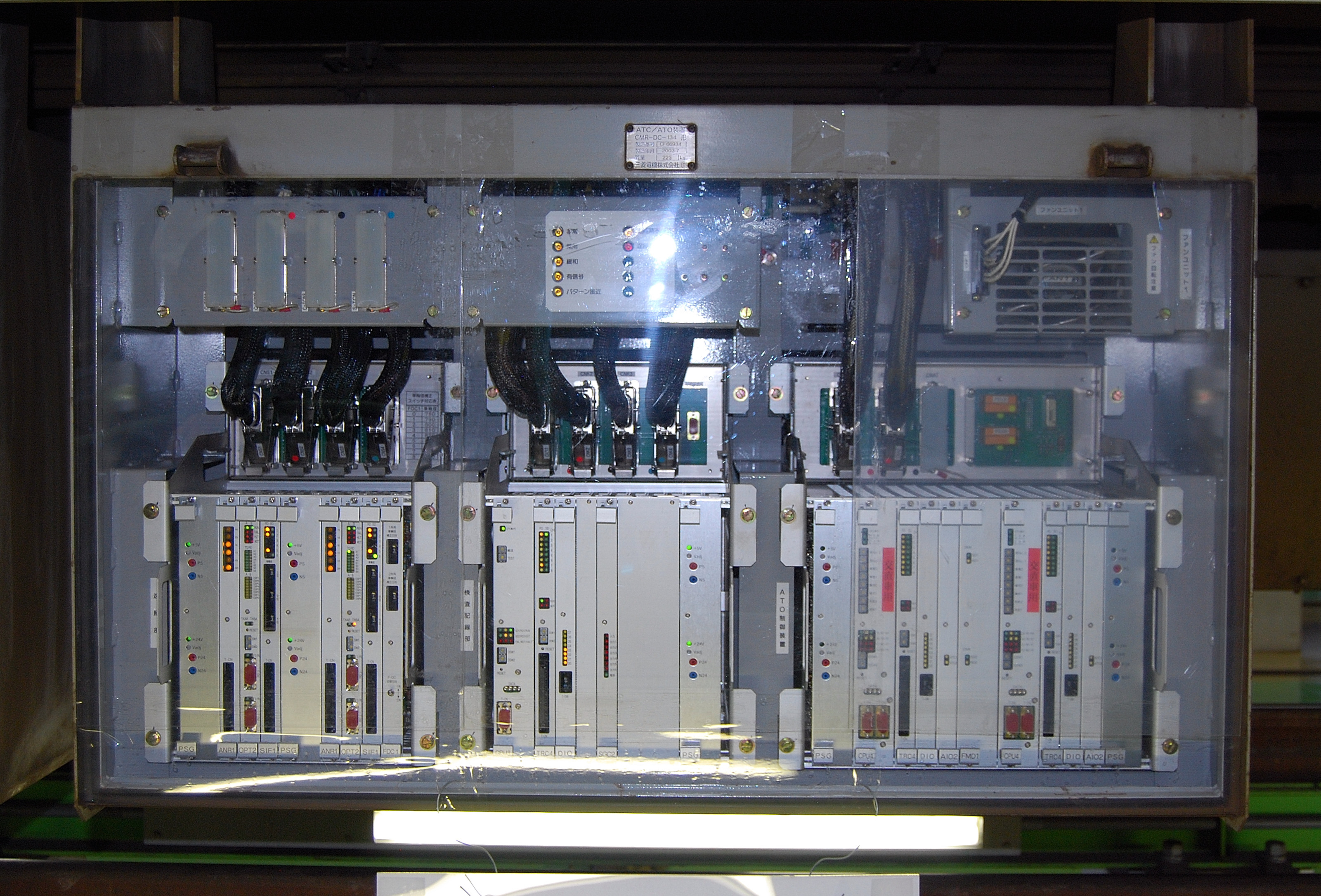 首都圏新都市鉄道TX-2000系のATO/ATC装置 公開の為、透明なアクリル板が付けられいる（つくばエキスプレス祭りでの車両基地開放時に撮影）